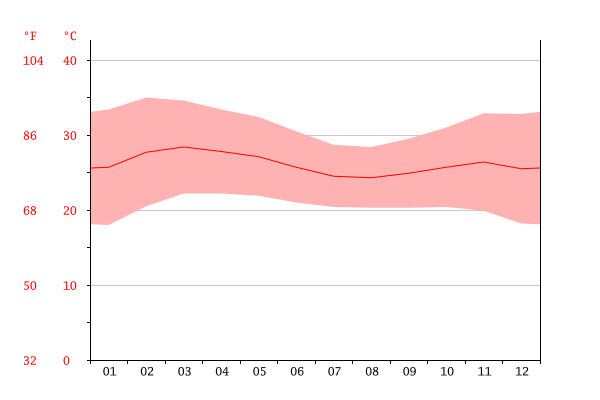 Graphe de la temperature, Tafiré